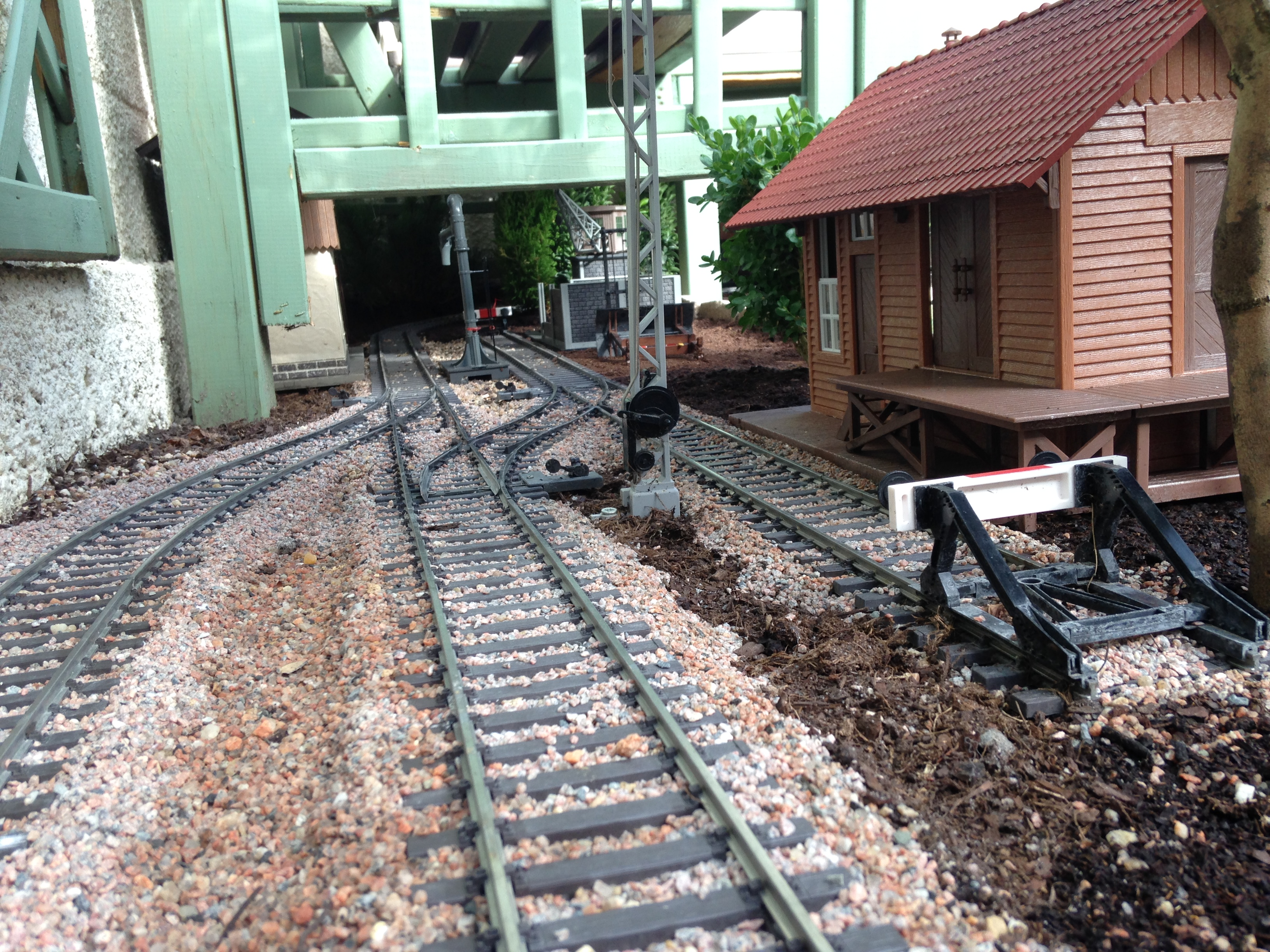 Gartenbahn Spur 1 -Märklin Gleis